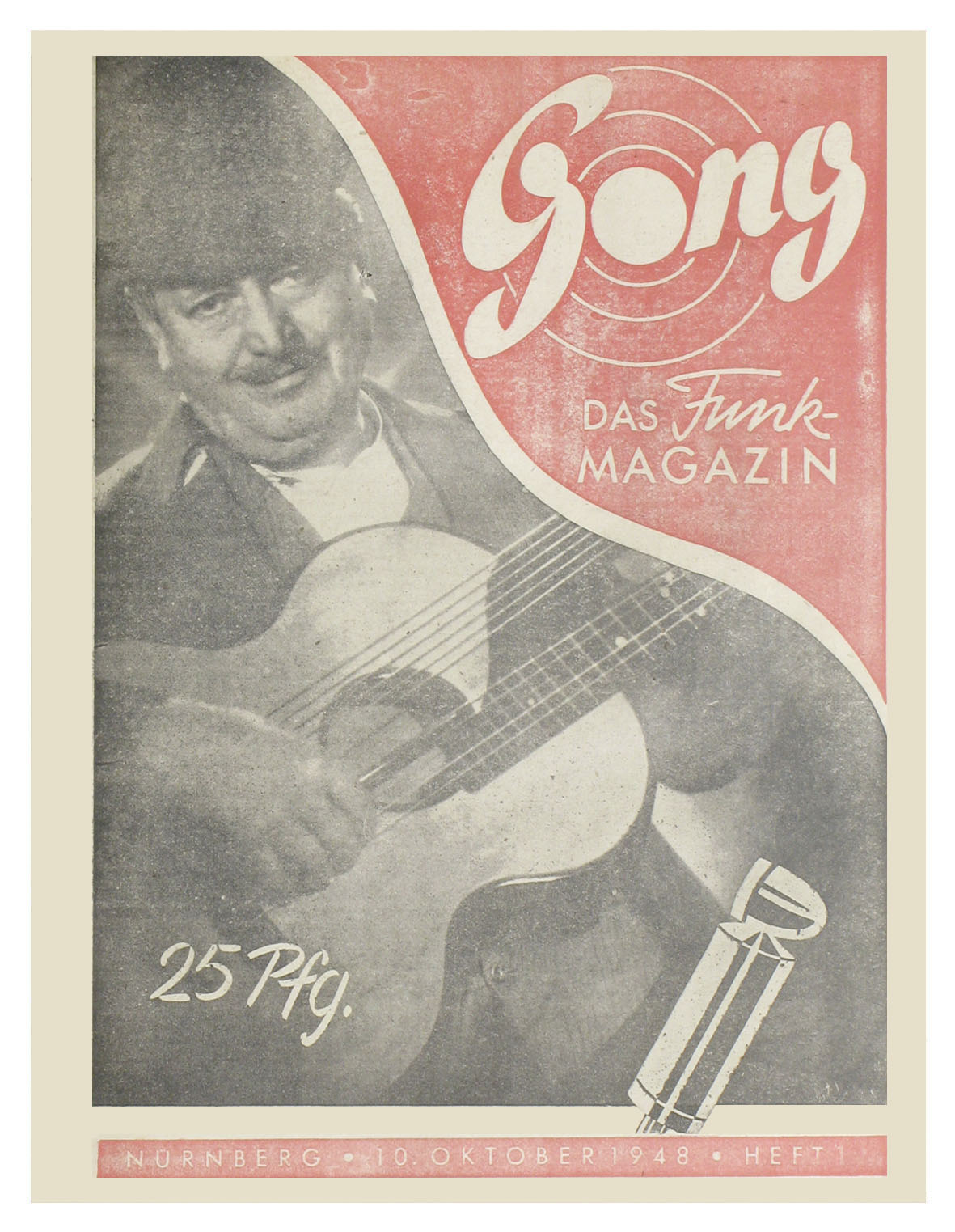 Titelbild / Cover der Zeitschrift Gong der Ausgabe 01-1948 (Heft 1)